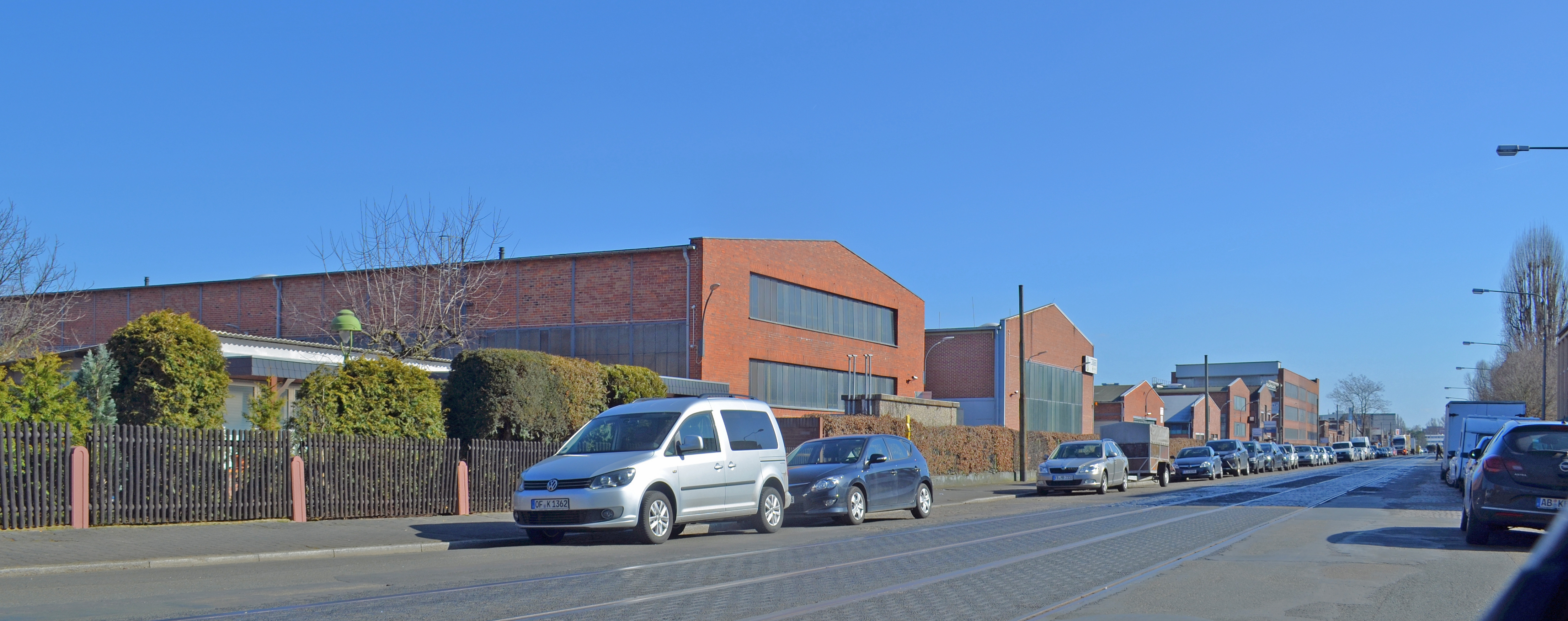 Frankfurt-Seckbach, Gwinnerstraße. Blick auf Teilbereich/Teilbebauung des ehemaligen 18 Gebäude umfassenden 26.000 m² großen Firmengeländes der vormaligen Hans J. Zimmer AG, der späteren Lurgi/Zimmer AG. Das Unternehmen wurde 2007 an die französische Air Liquide Gruppe verkauft. Derzeitiger Grundstückseigentümer GEA Real Estate will das Gelände komplett räumen und dann verkaufen.